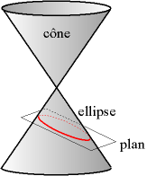 L'ellipse est l'intersection d'un cône et d'un plan, lorsque le plan traverse le cône de part en part Auteur : Christophe Dang Ngoc Chan, réalisé avec un programme de dessin vectoriel Licence GFDL Christophe Dang Ngoc Chan